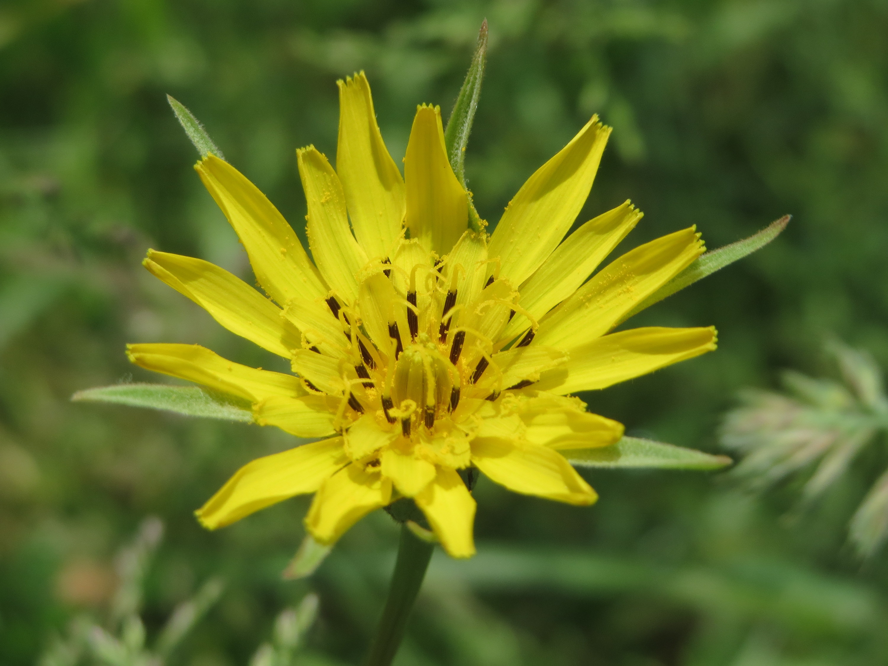 Wiesen-Bocksbart (Tragopogon pratensis) an der Saar in Saarbrücken